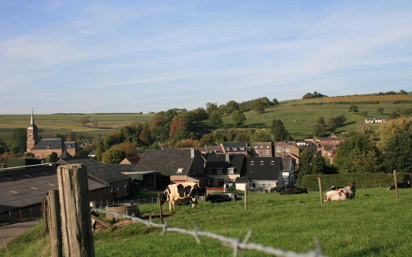 Limburgs: Ees (Eijs) in Zuud Limburg